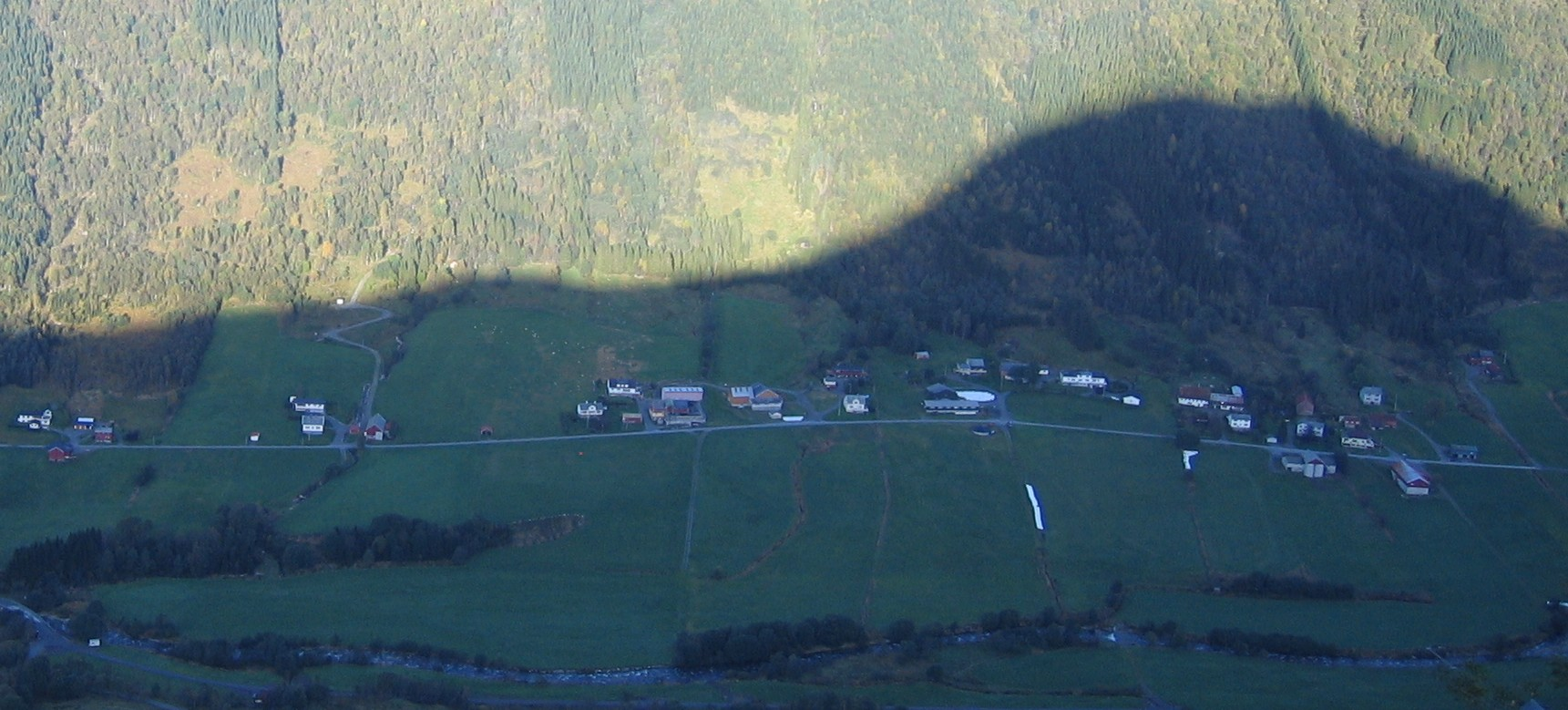 Myklebust i Vartdal, Ørsta, Møre og Romsdal